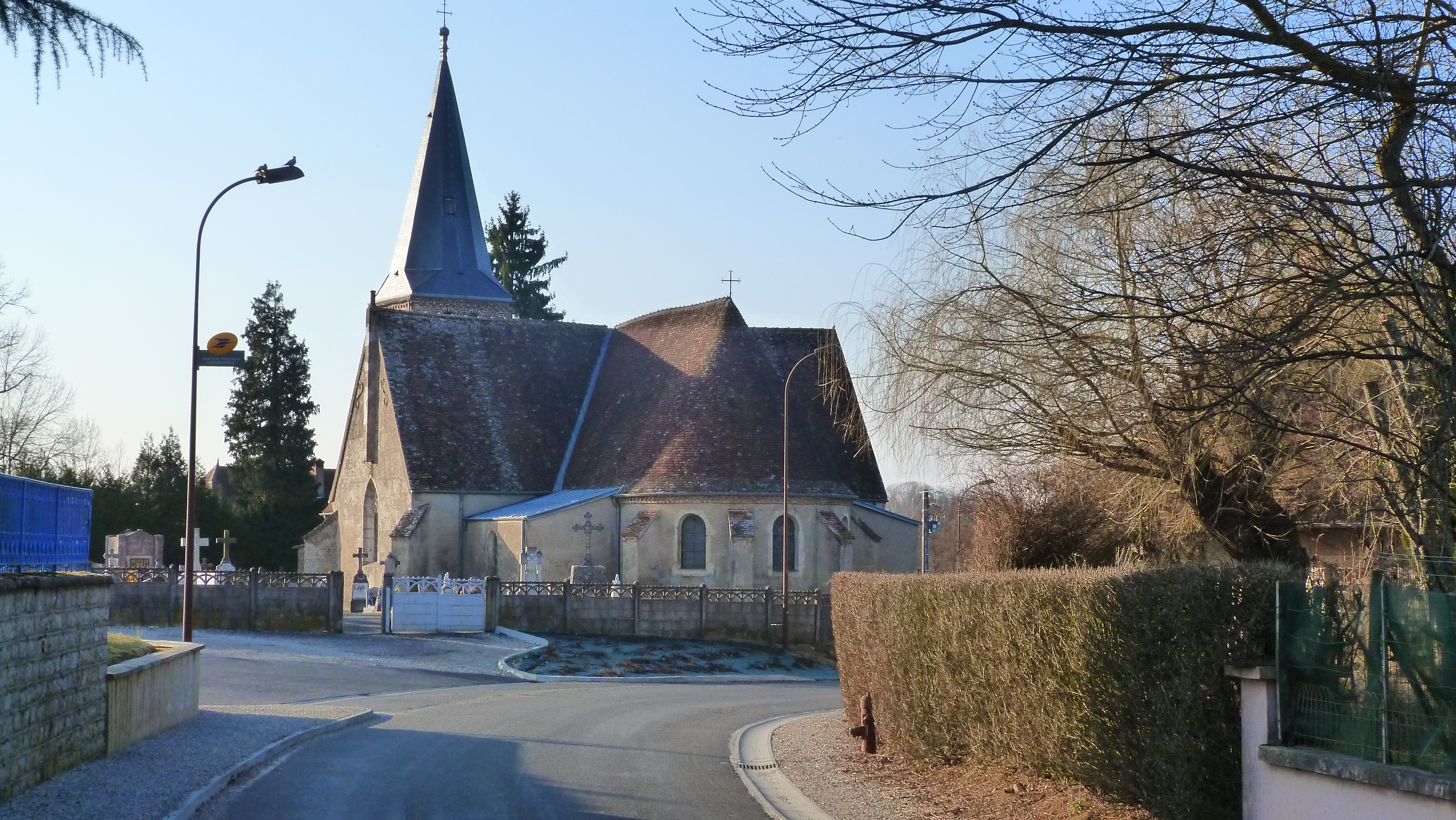 Le Fay